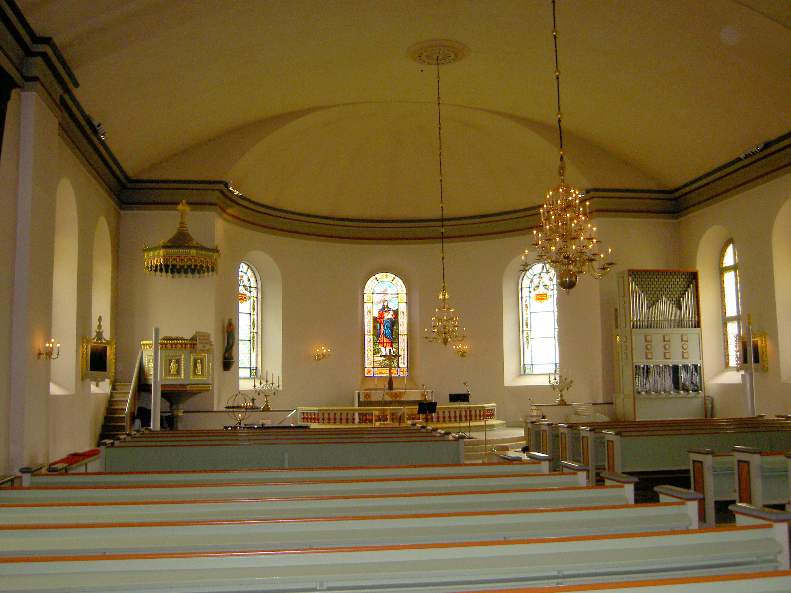 Kyrkorum i Hjo kyrka